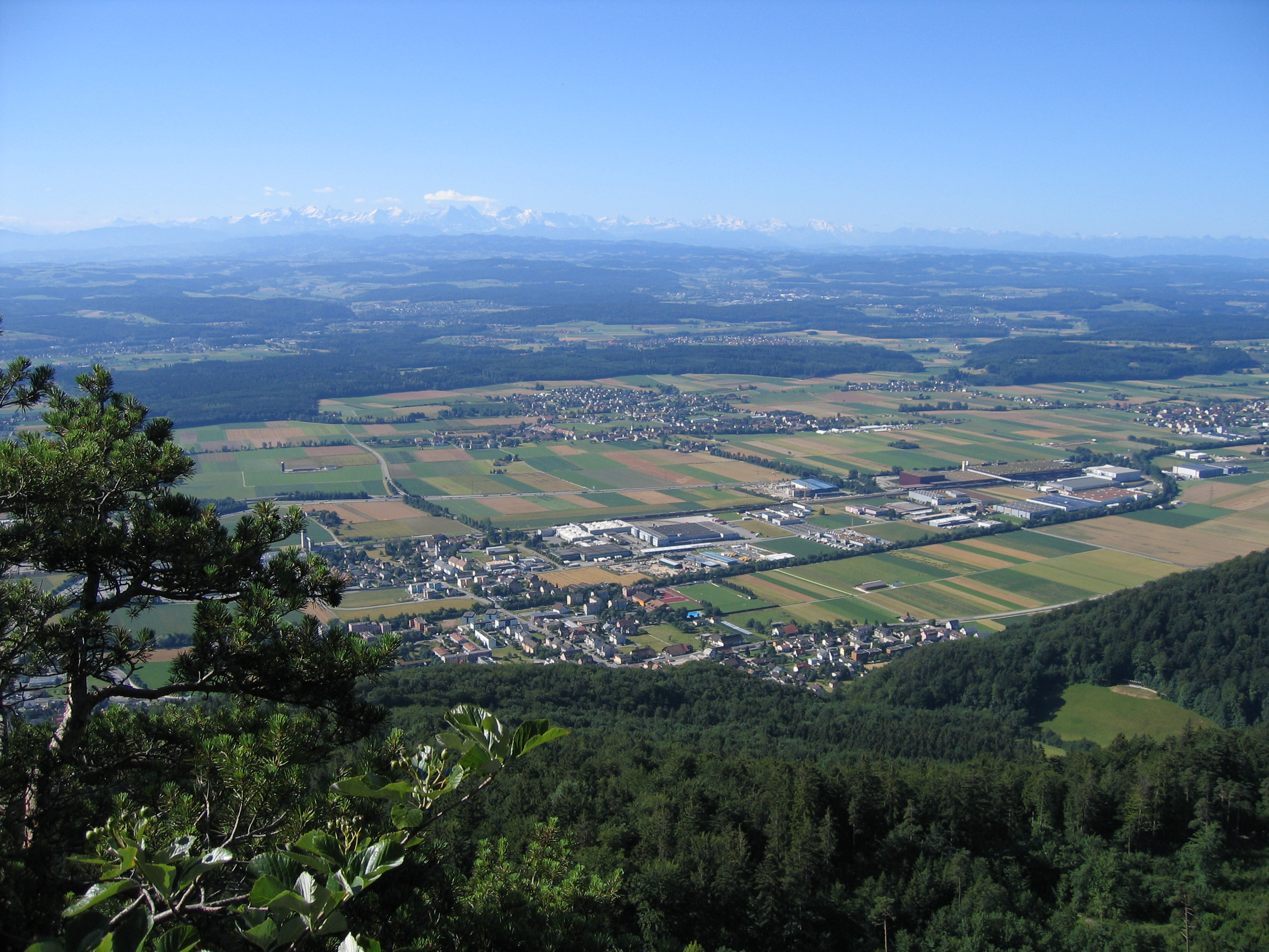 Blick von der Egerkinger "Höchi Flue" Richtung Alpen